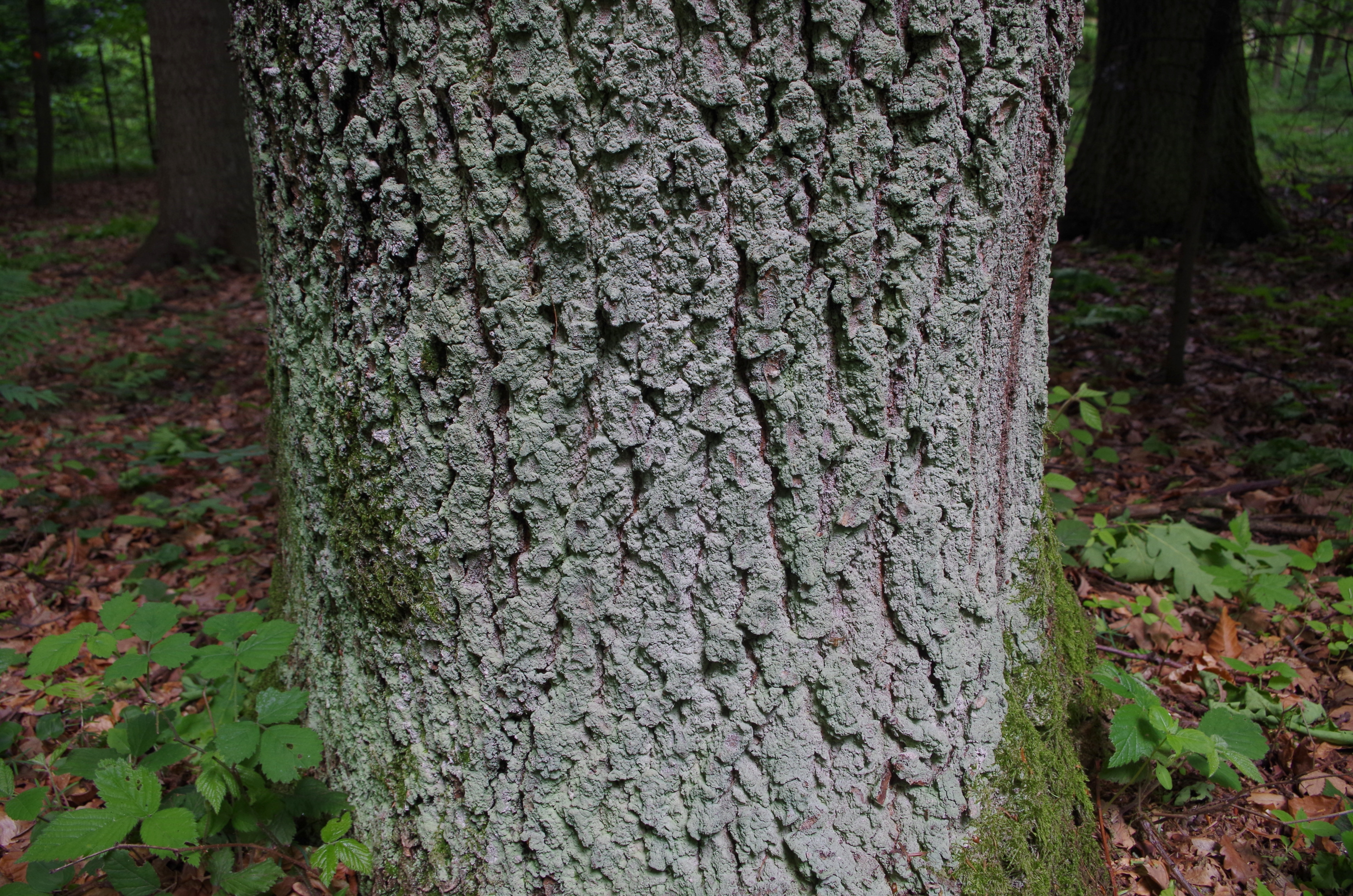 Lepraria incana